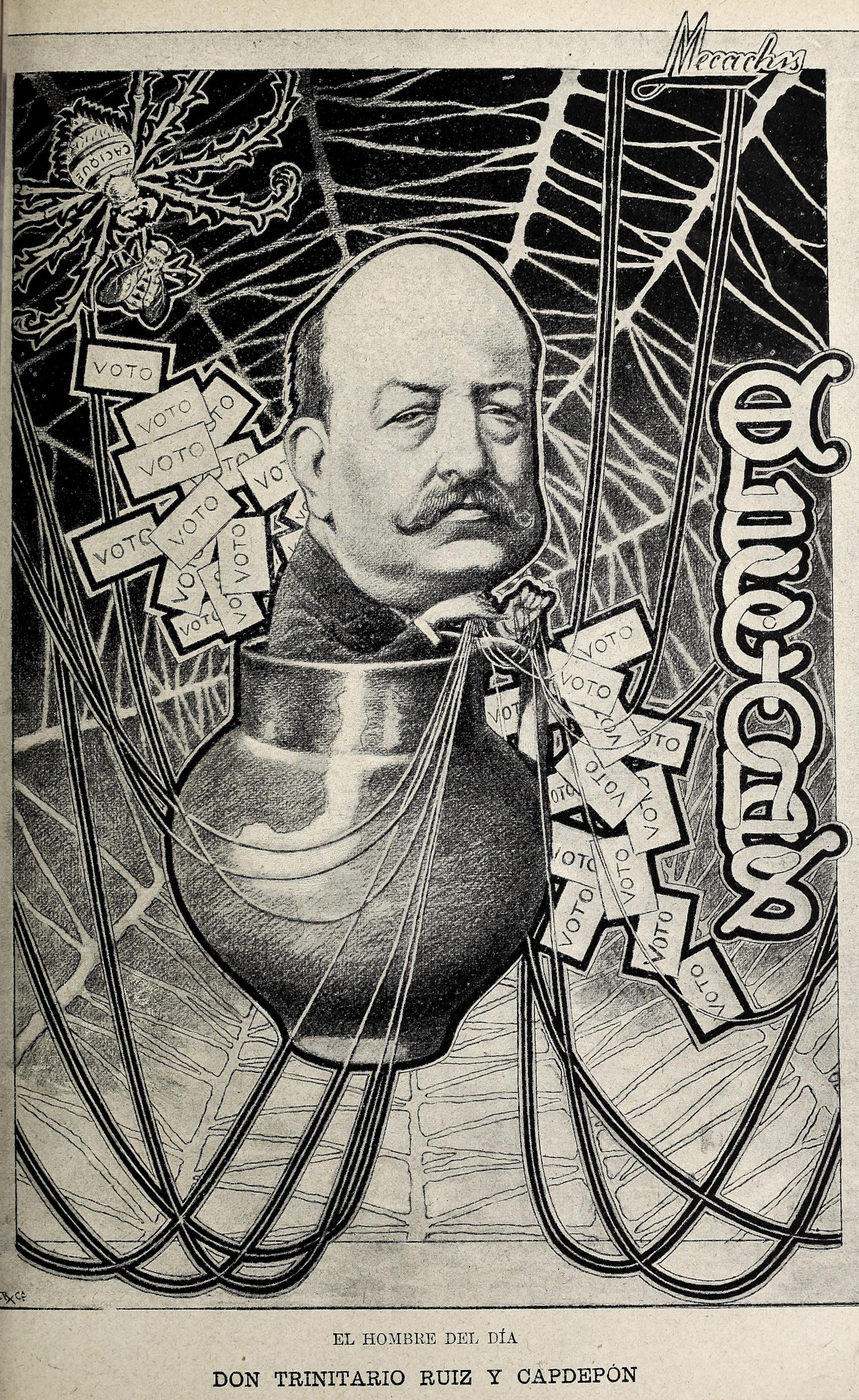 El hombre del día. Don Trinitario Ruiz y Capdepón.